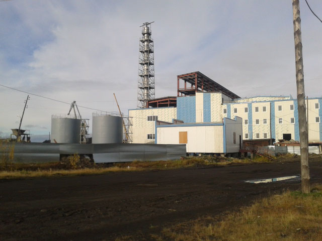 Недостроенная мини-ТЭЦ в Зырянке